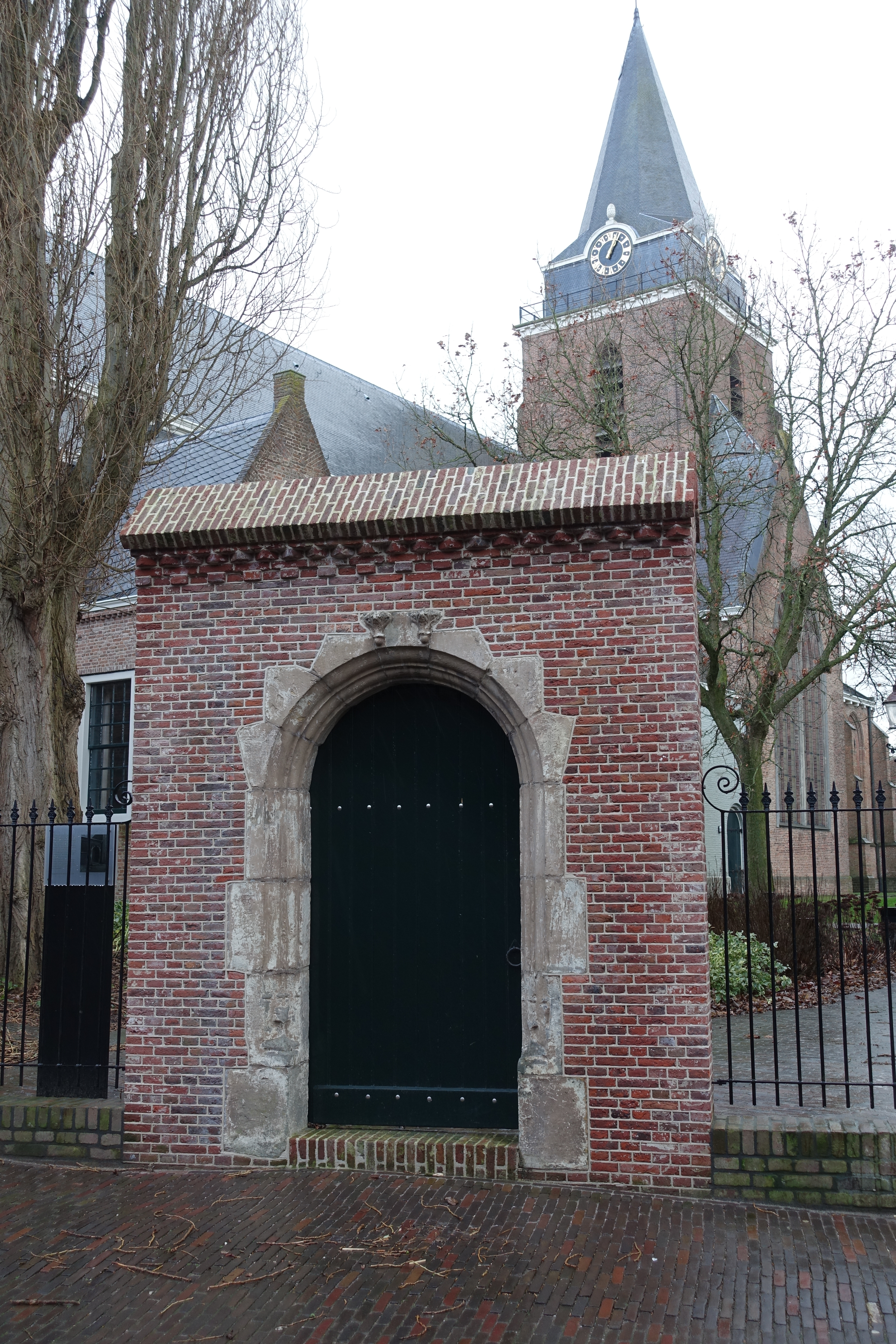 Gildepoortje in Woerden, voorzijde